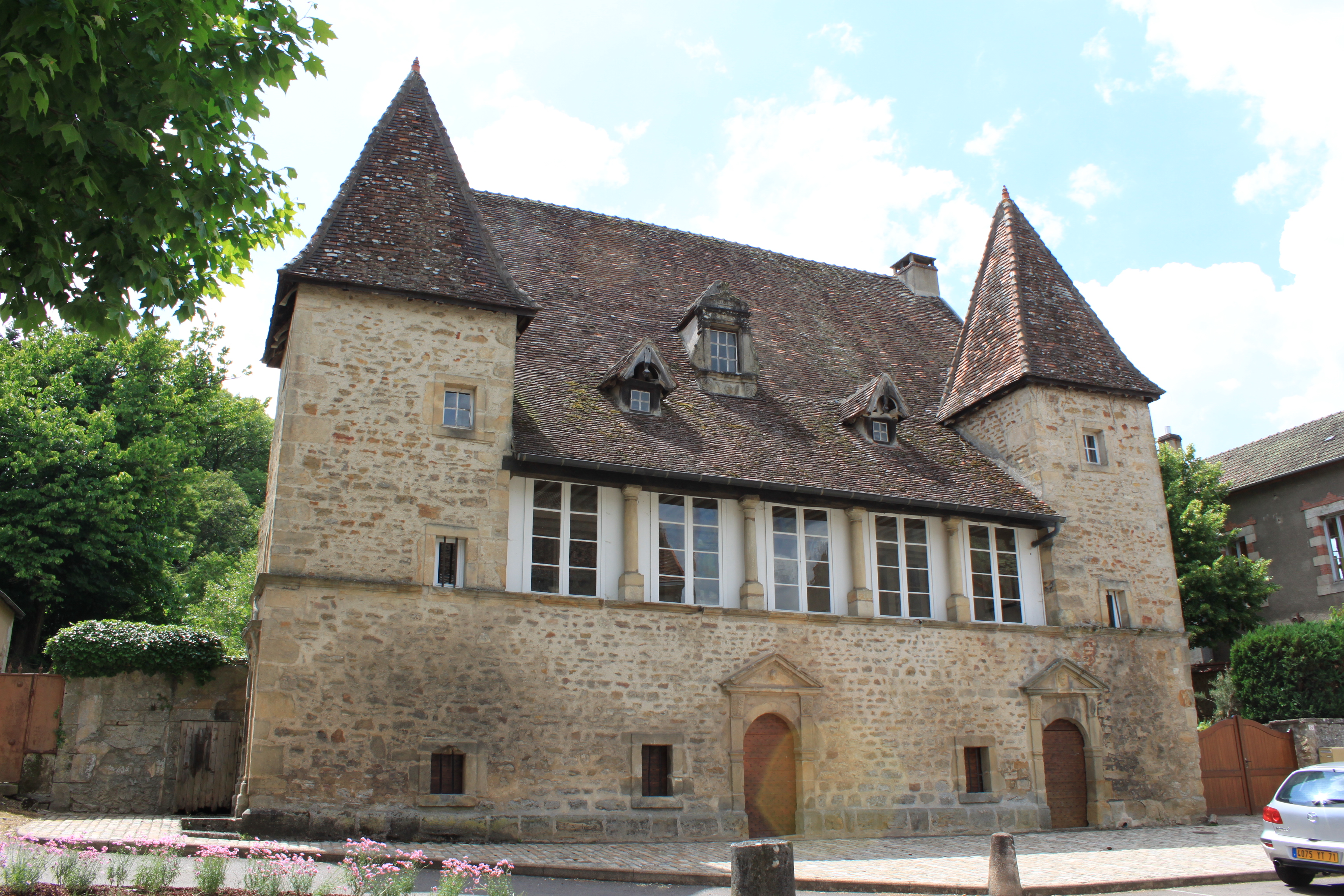 Couches, Saône-et-Loire, Bourgogne, France